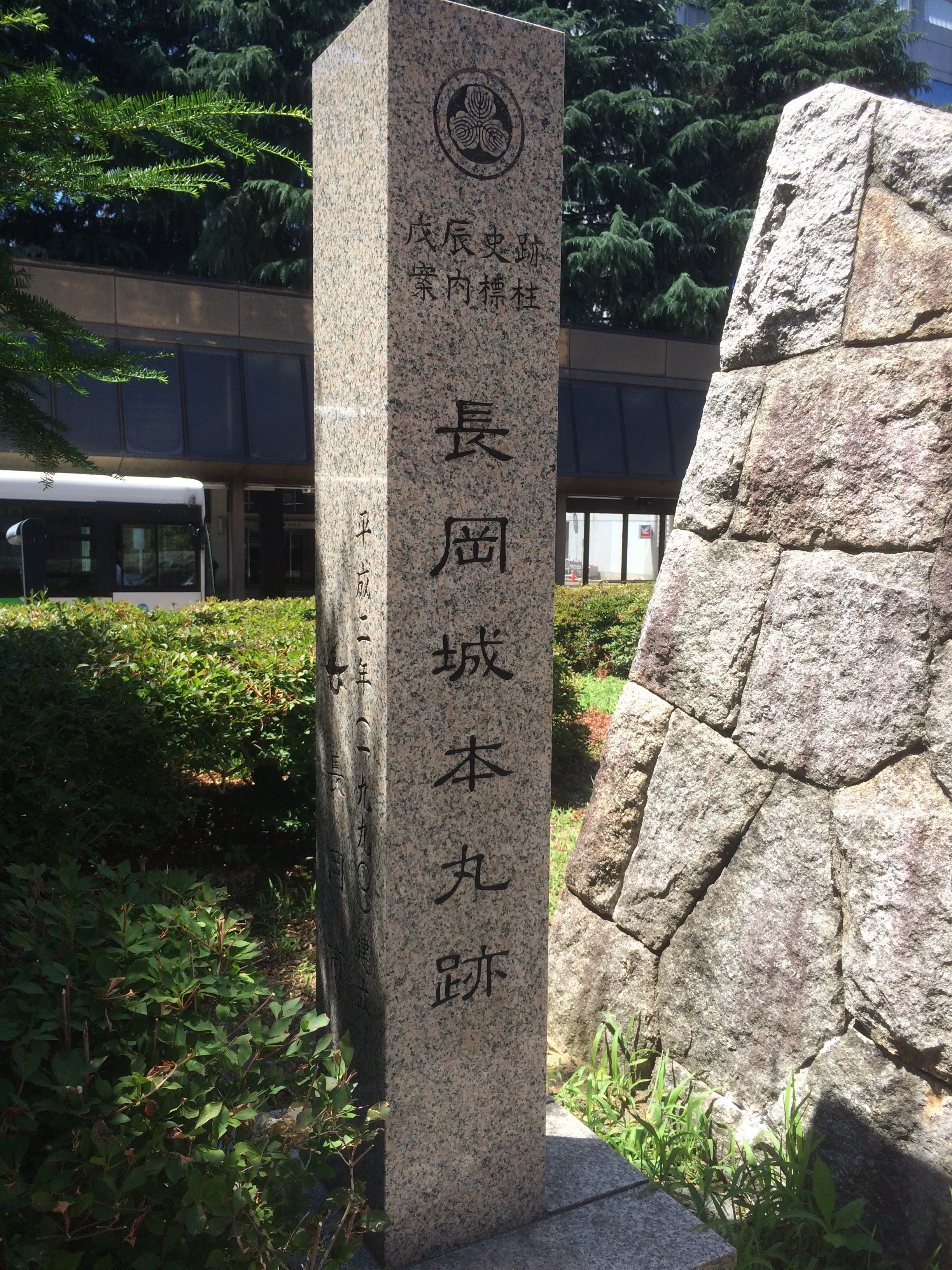 長岡城本丸跡・石碑